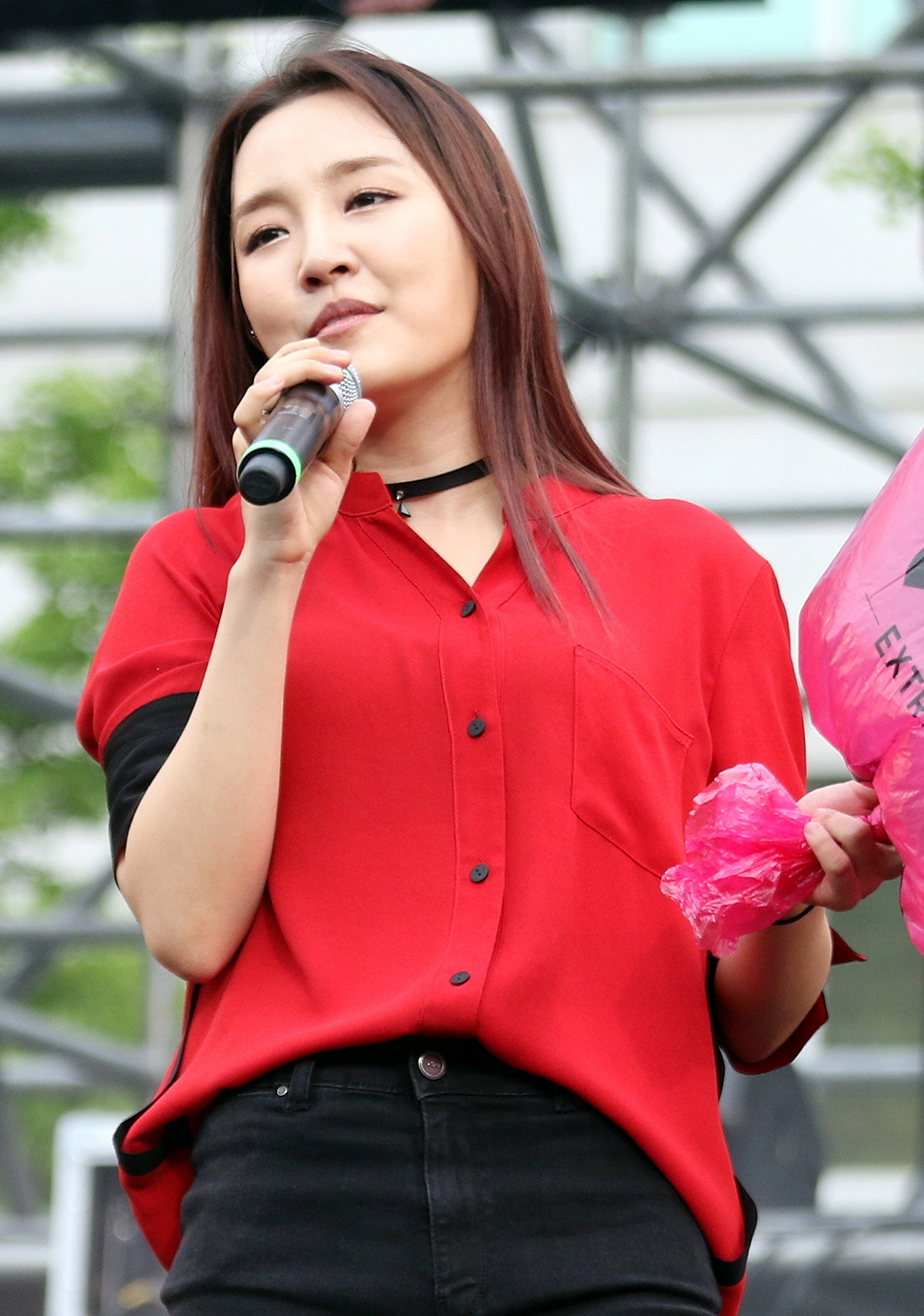 160527 입실렌티 윤하